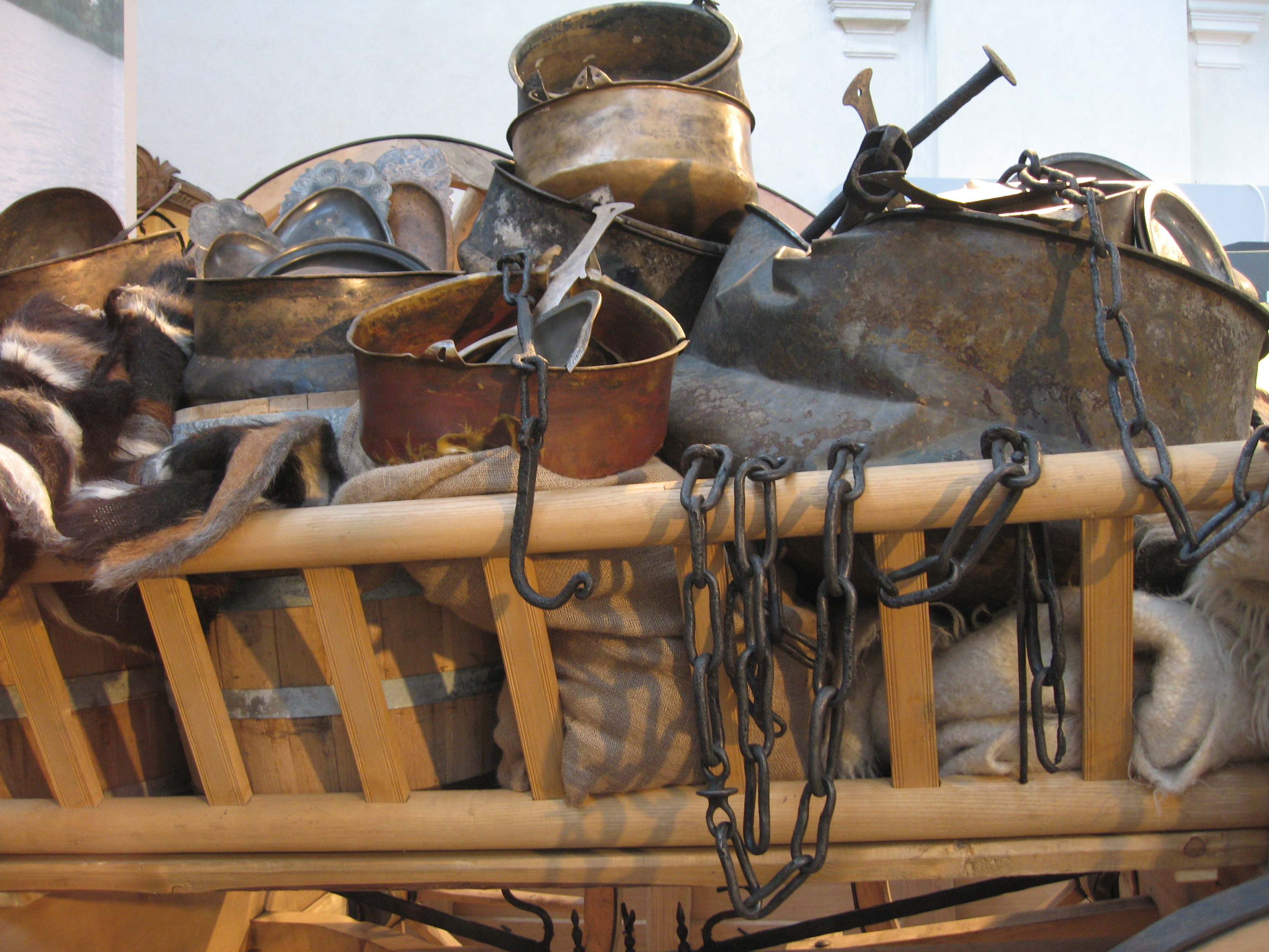 Nachstellung der Barbarenbeute